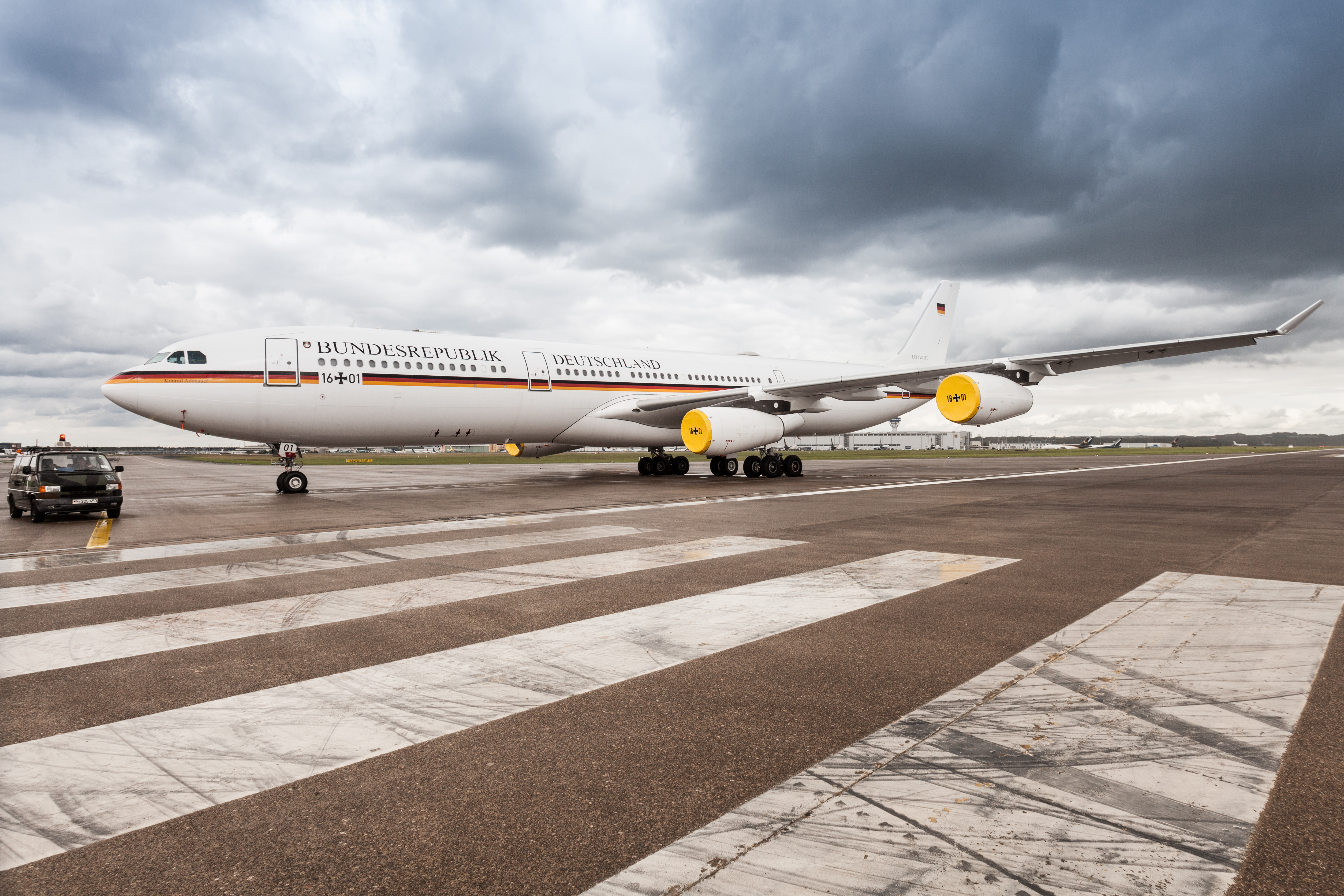 Konrad Adenauer (Flugzeug)